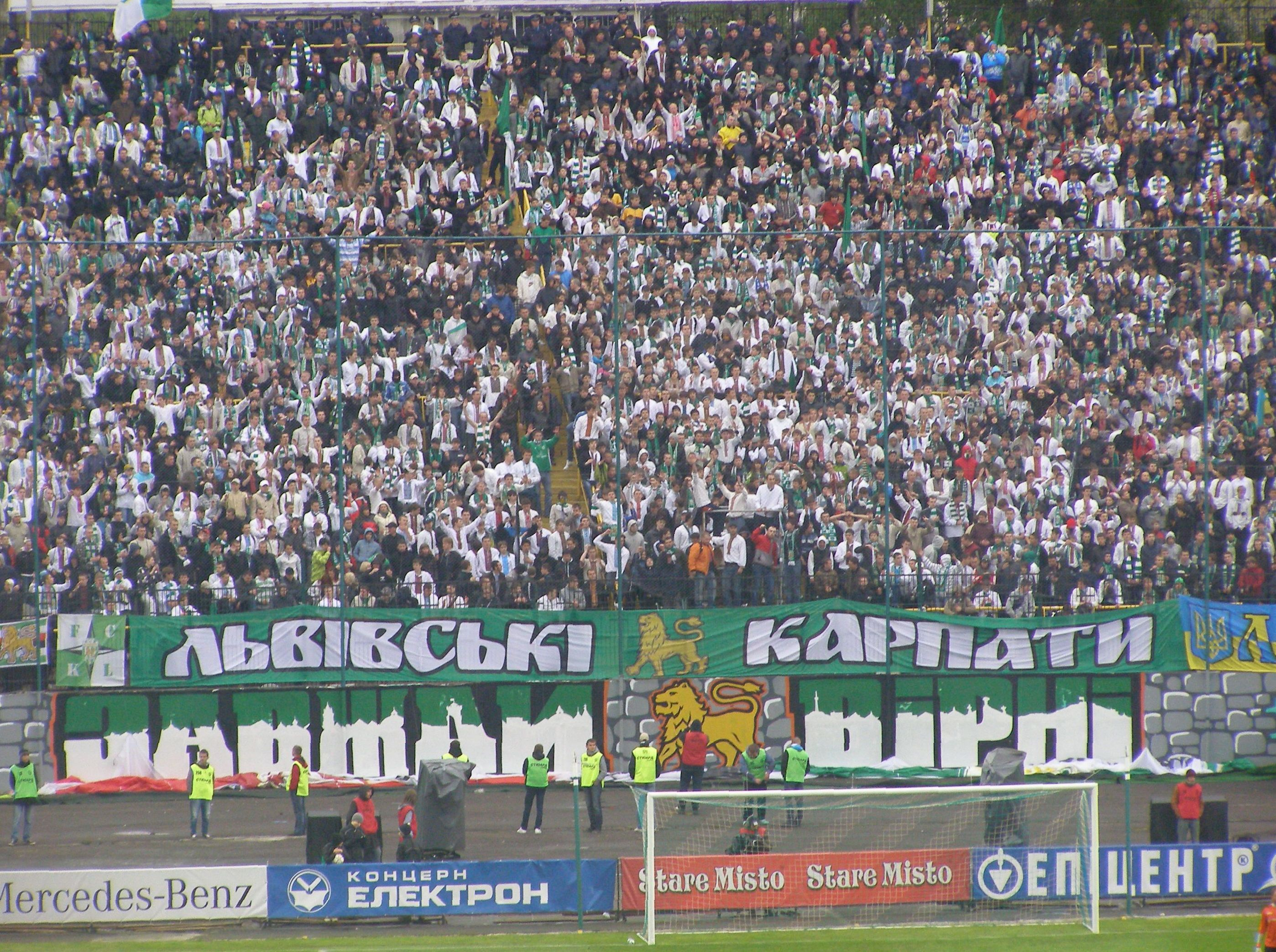 Anhänger von Karpaty Lwiw tragenden die traditionelle ukrainische Tracht - "Wyschywanka"